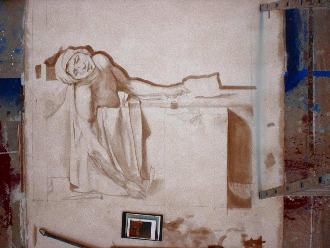 Theatermalerei nach David's Marat. Hier zu sehen ist die Tinterung des Bühnenprospektes. Angefertigt von Natalie Schaffler